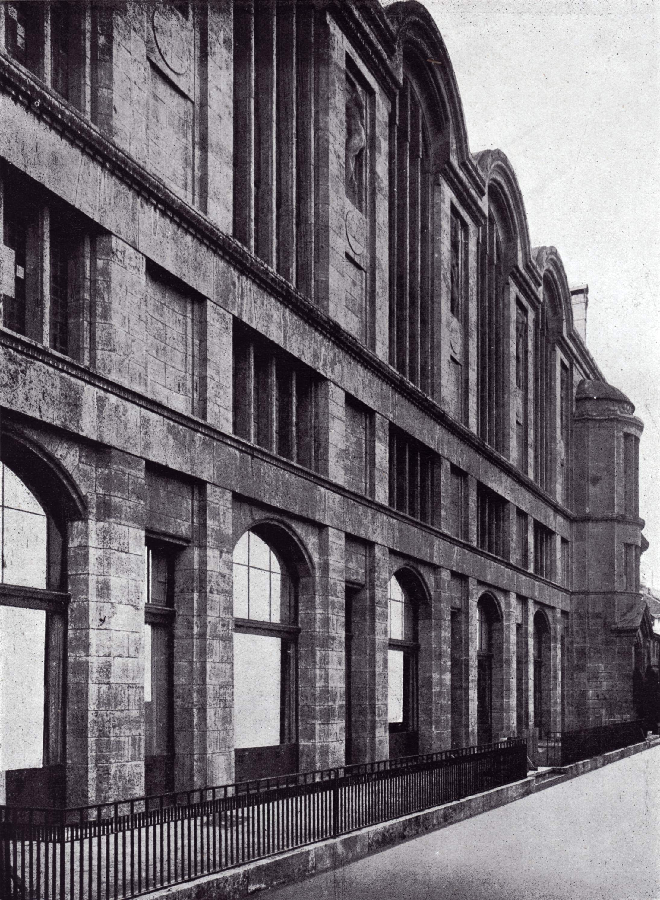 Berlin - Weinhaus Rheingold, Ansicht von der Bellevuestraße 1907